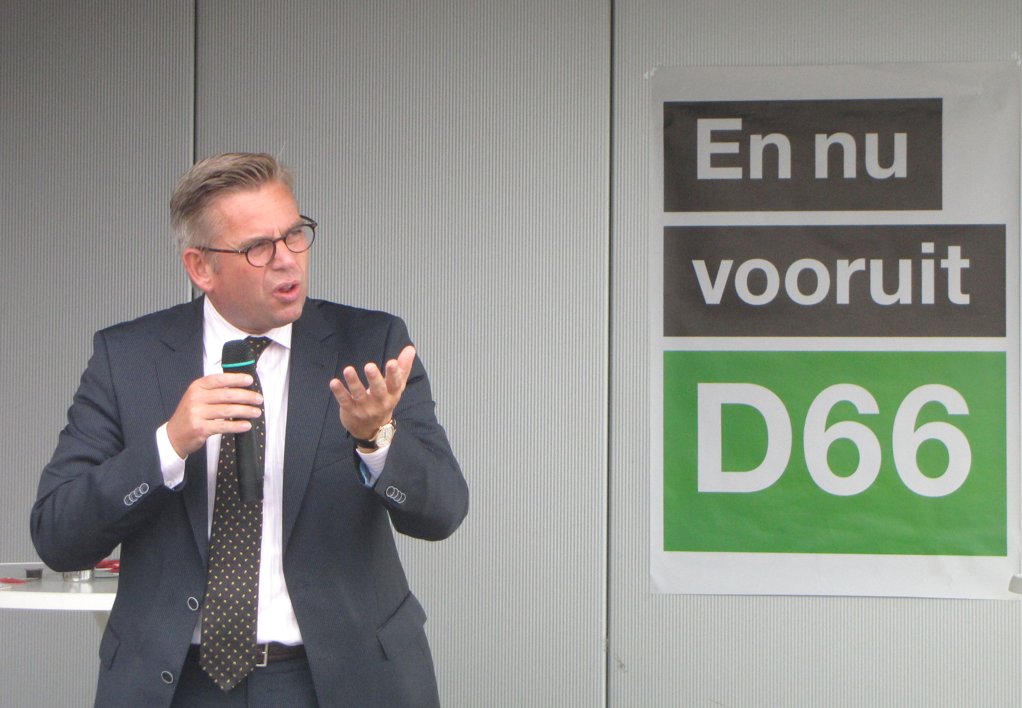 Verkiezingen Tweede Kamer 2012. Achterhoek. Gerard Schouw.